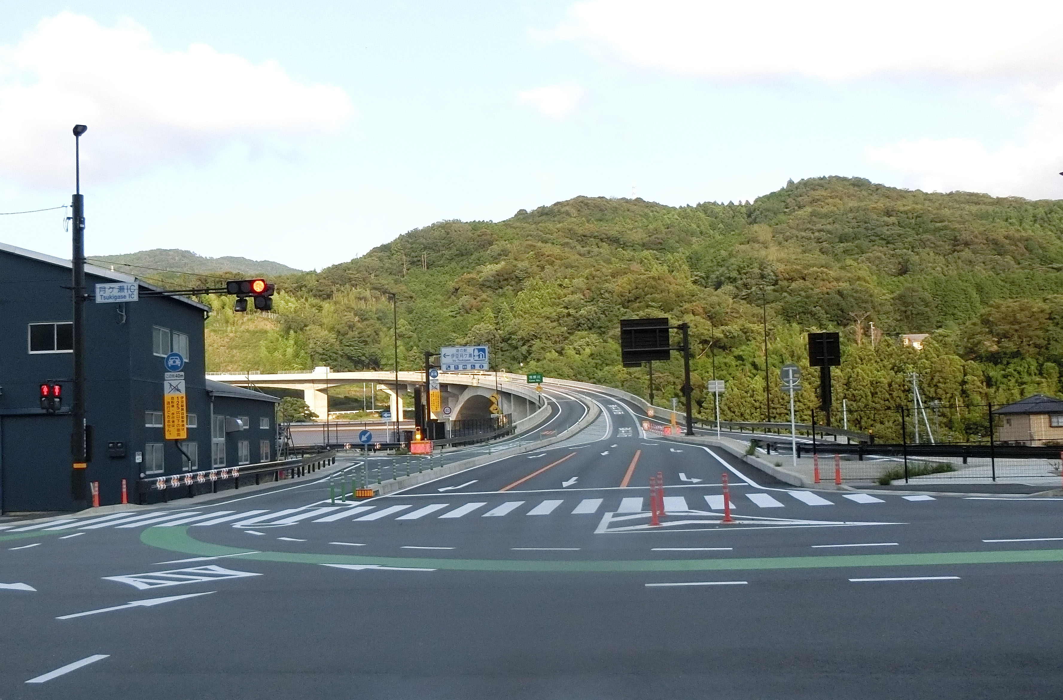 月ケ瀬インターチェンジ